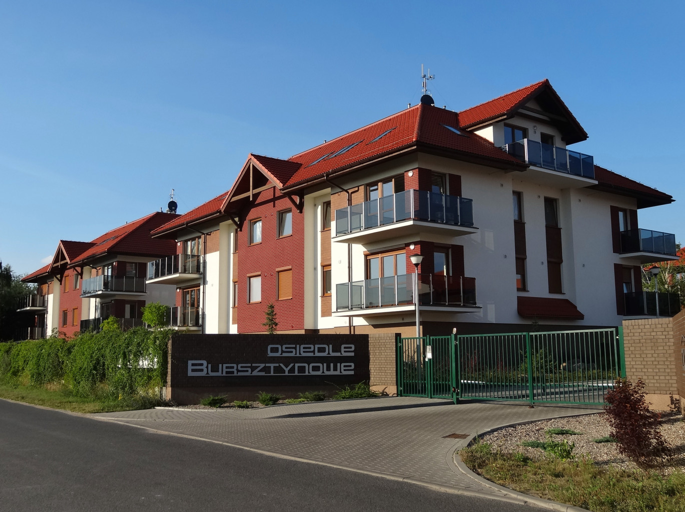 Osielsko, gmina Osielsko, powiat bydgoski